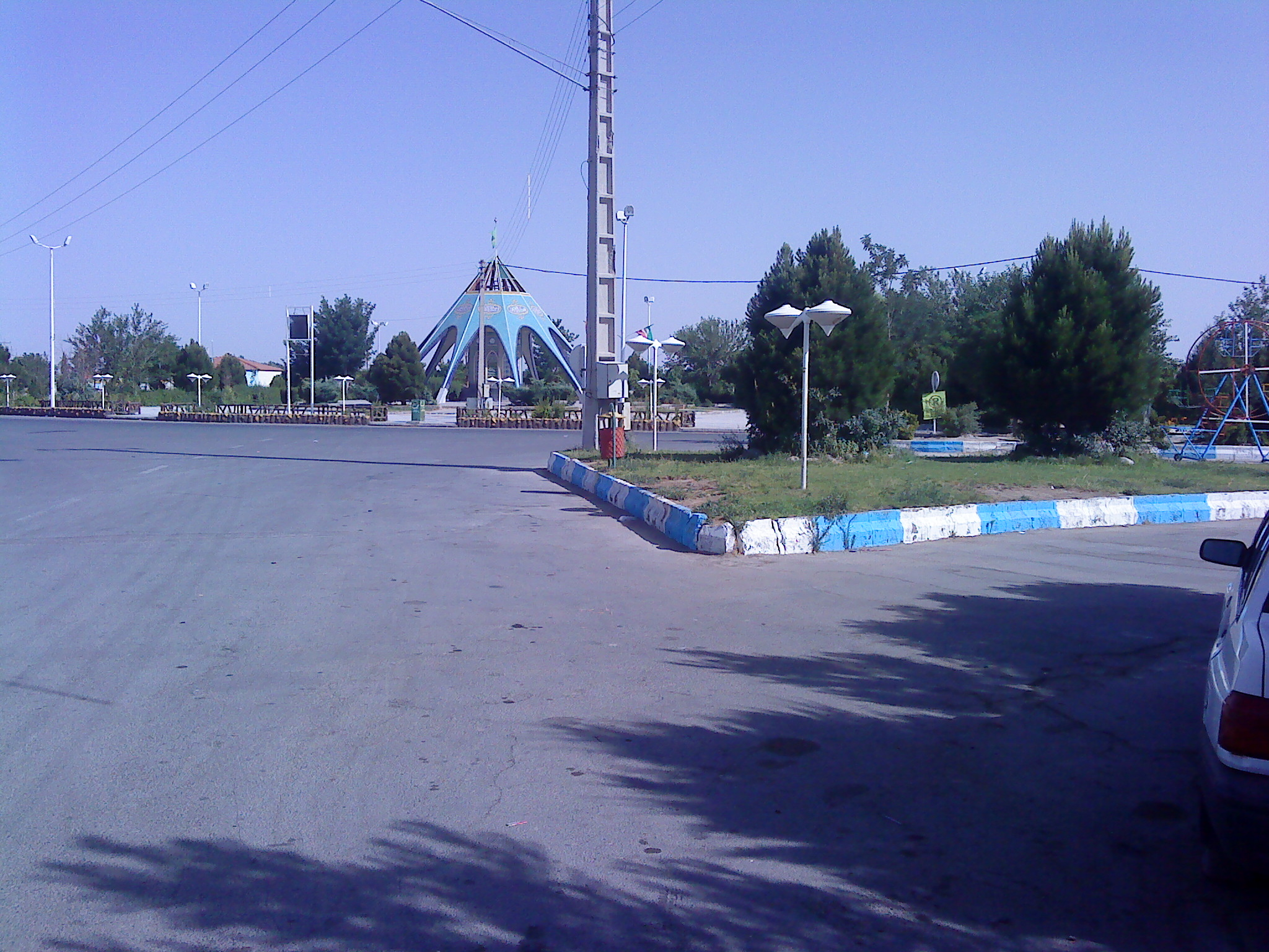 نمایی از شهر بابک